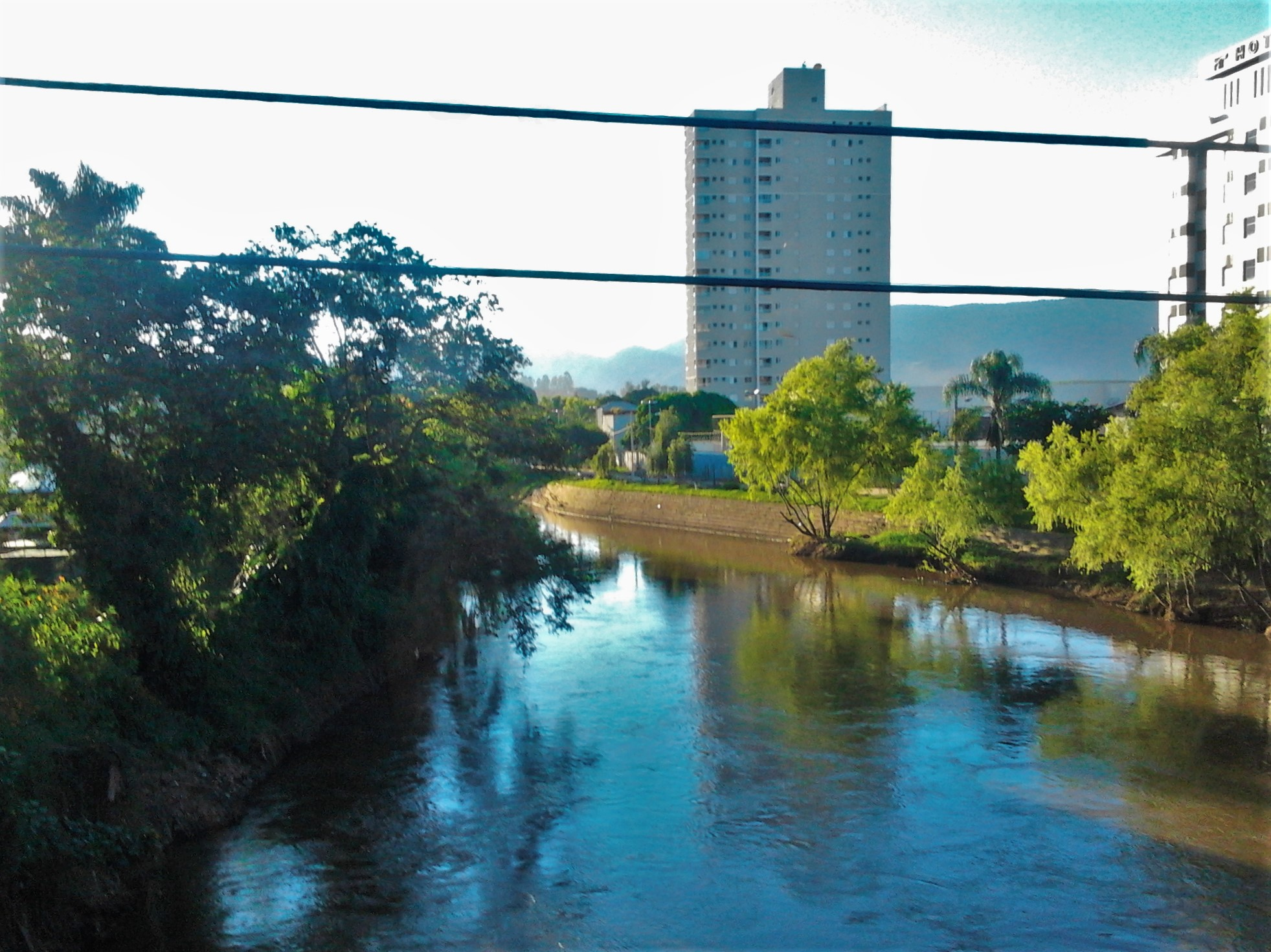 Fotografia a partir de uma ponte sobre o rio Sapucaí na cidade de Santa Rita do Sapucaí.